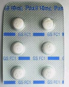 パキシルと言う薬の画像です。